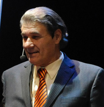 Periodista argentino Víctor Hugo Morales